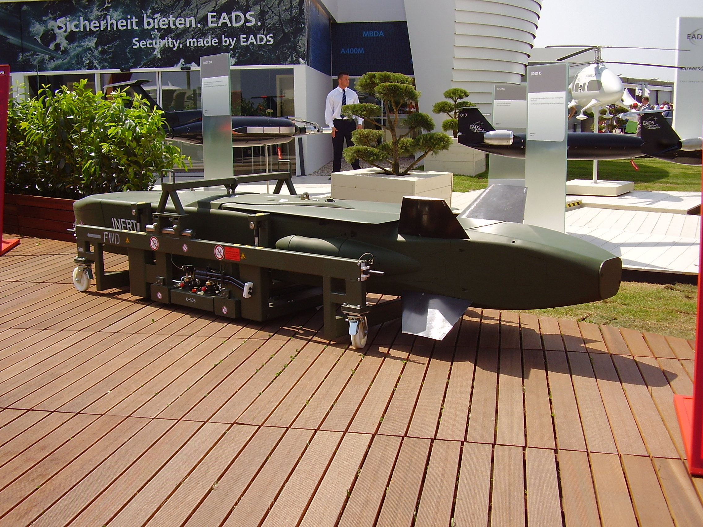 ILA 2008